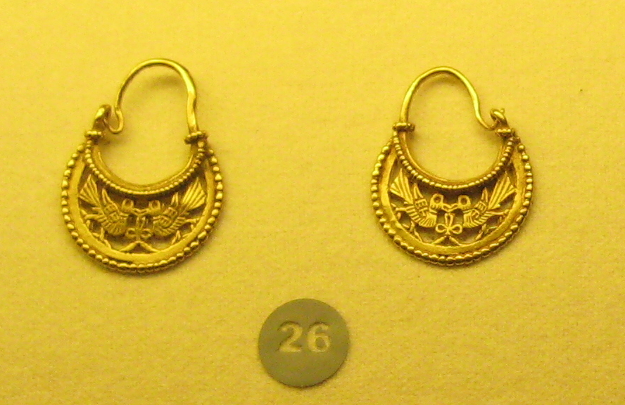 Серьги